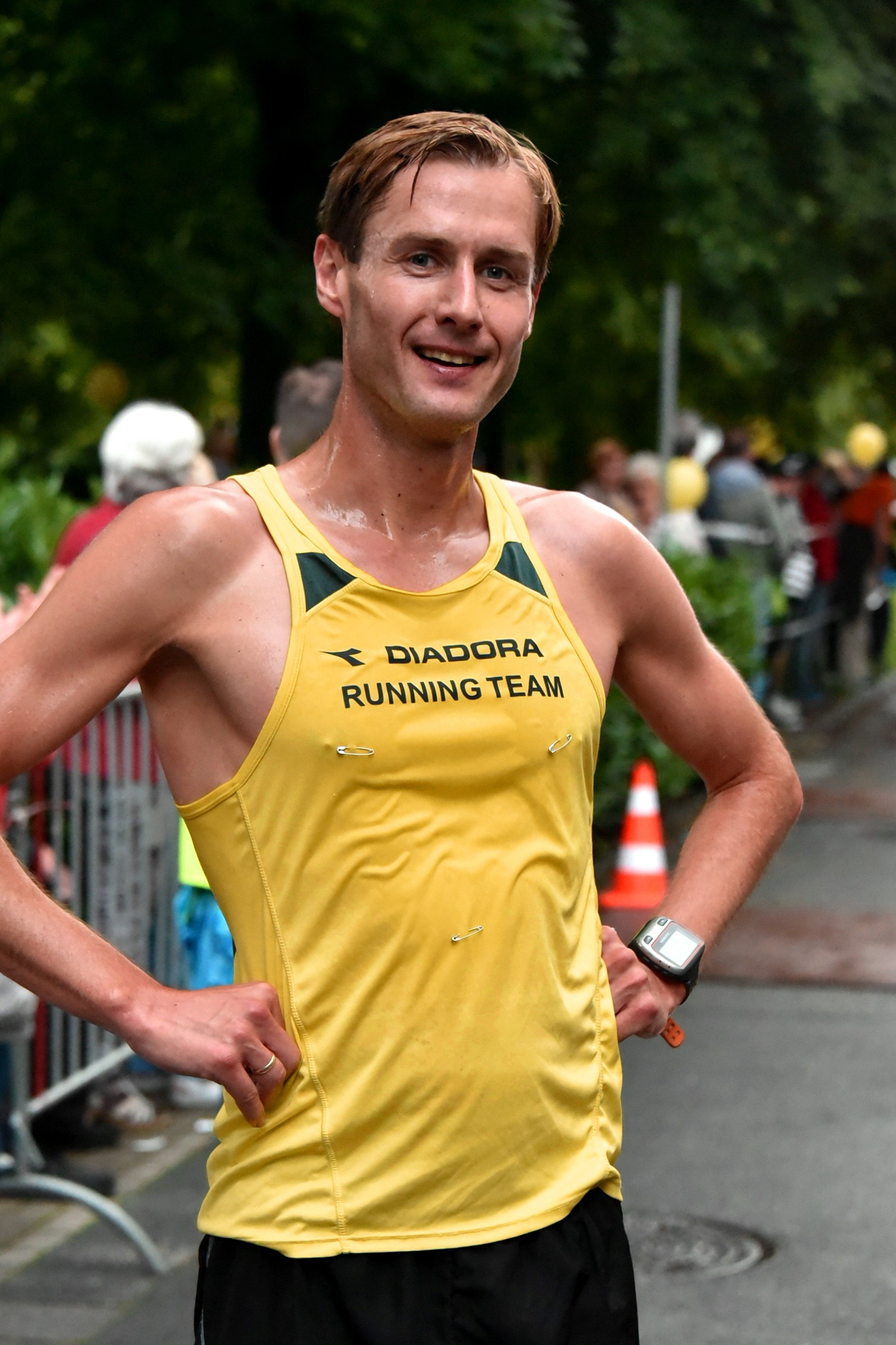 Horremer Abendlauf 2016 – Maciek Miereczko